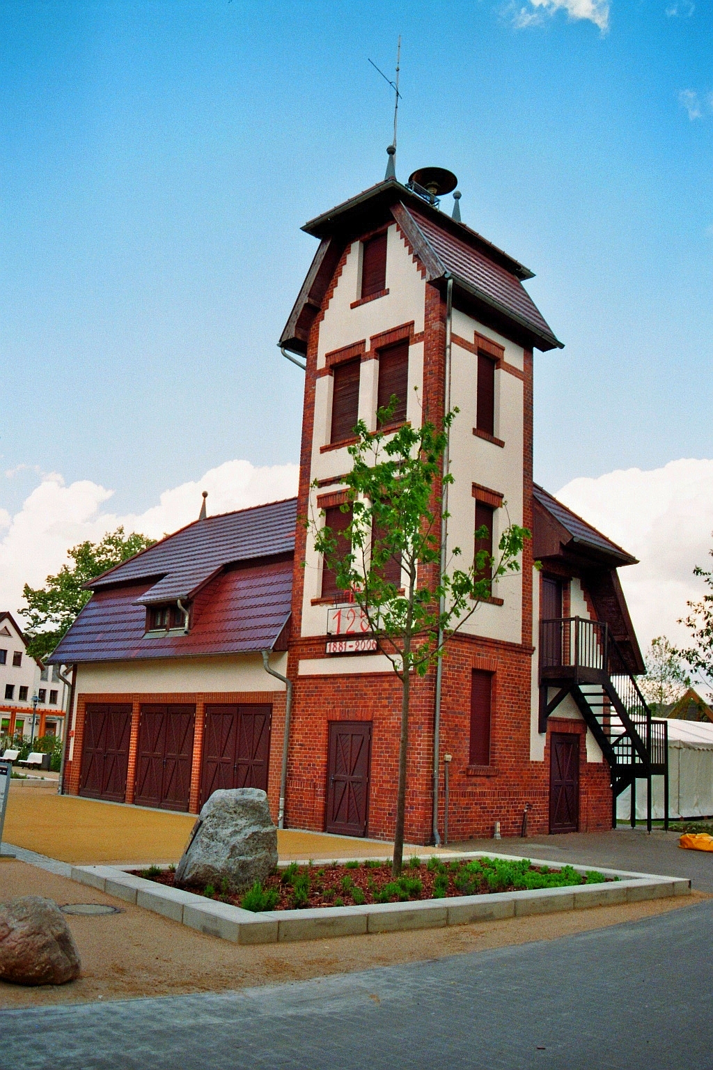 Feuerwehrmuseum (Alte Feuerwache) am Festplatz in Burg (Spreewald), Landkreis Spree-Neiße, Brandenburg, Deutschland.